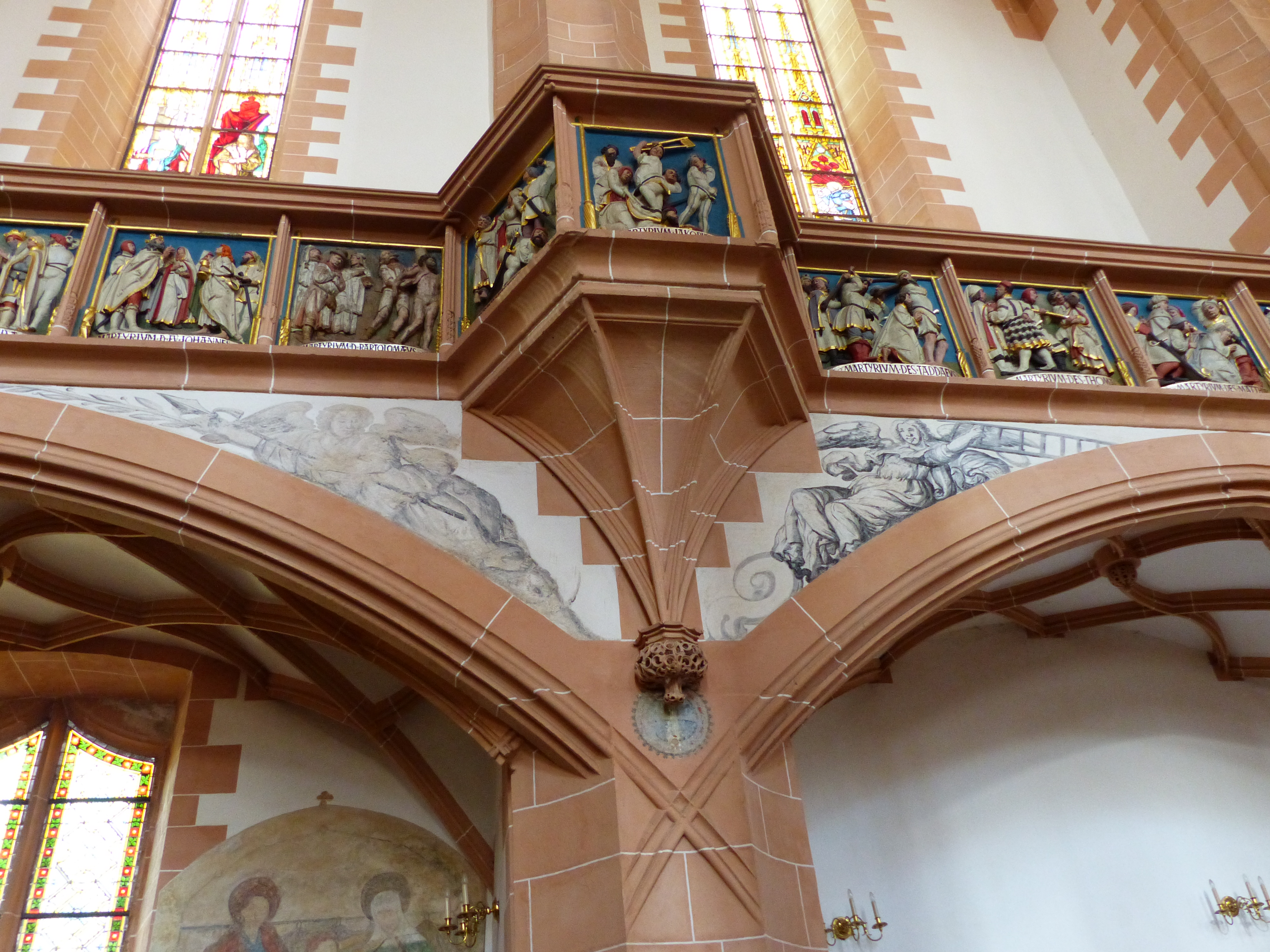 St. Annenkirche (Annaberg-Buchholz), Sachsen